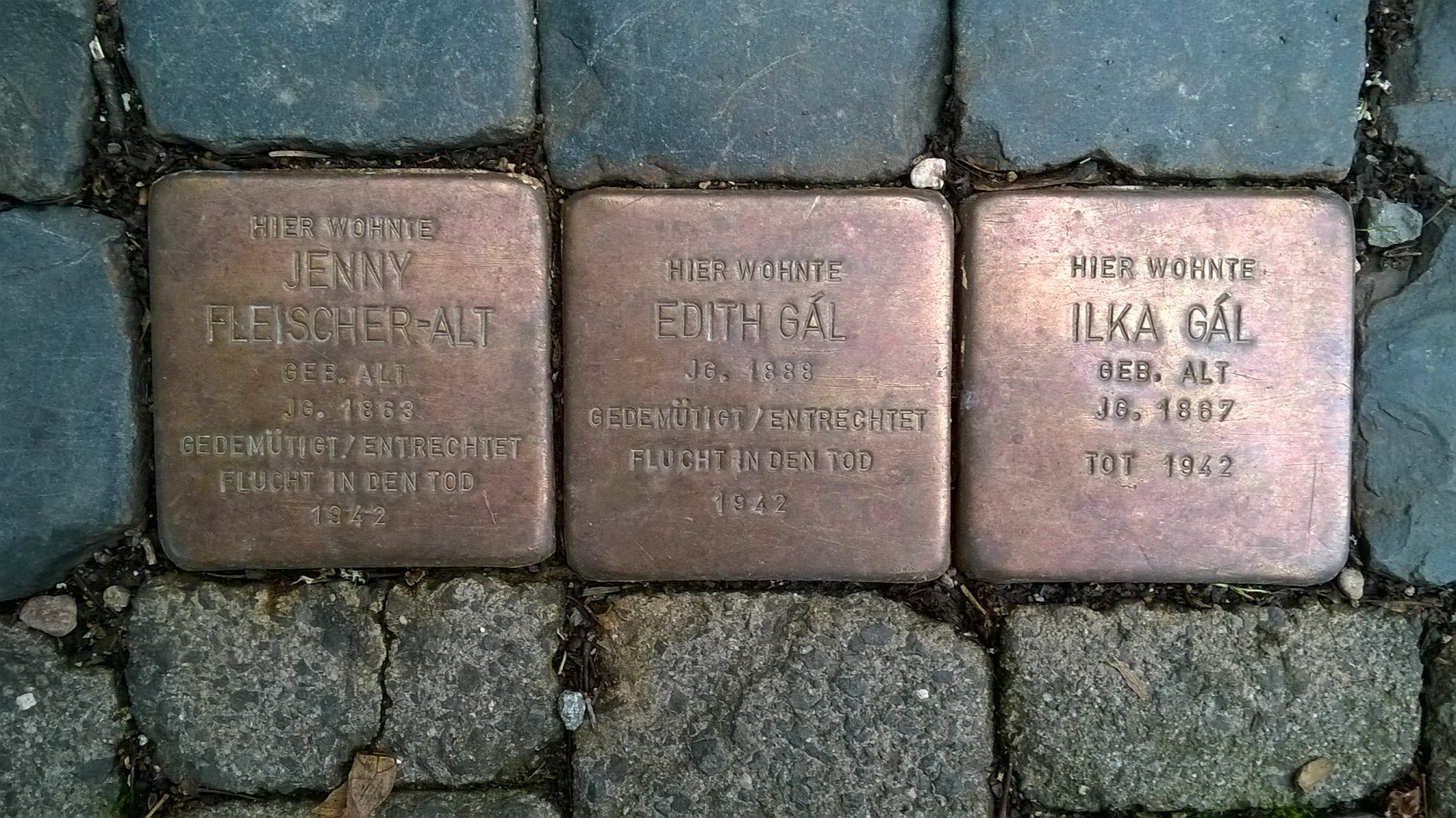 Stolpersteine vor der Belvederer Allee 6 in Weimar/Thüringen, dem mahnenden Gedenken an Edith und Ilka Gál und Jenny Fleischer-Alt gewidmet.